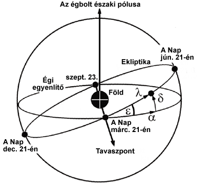 Ekliptika